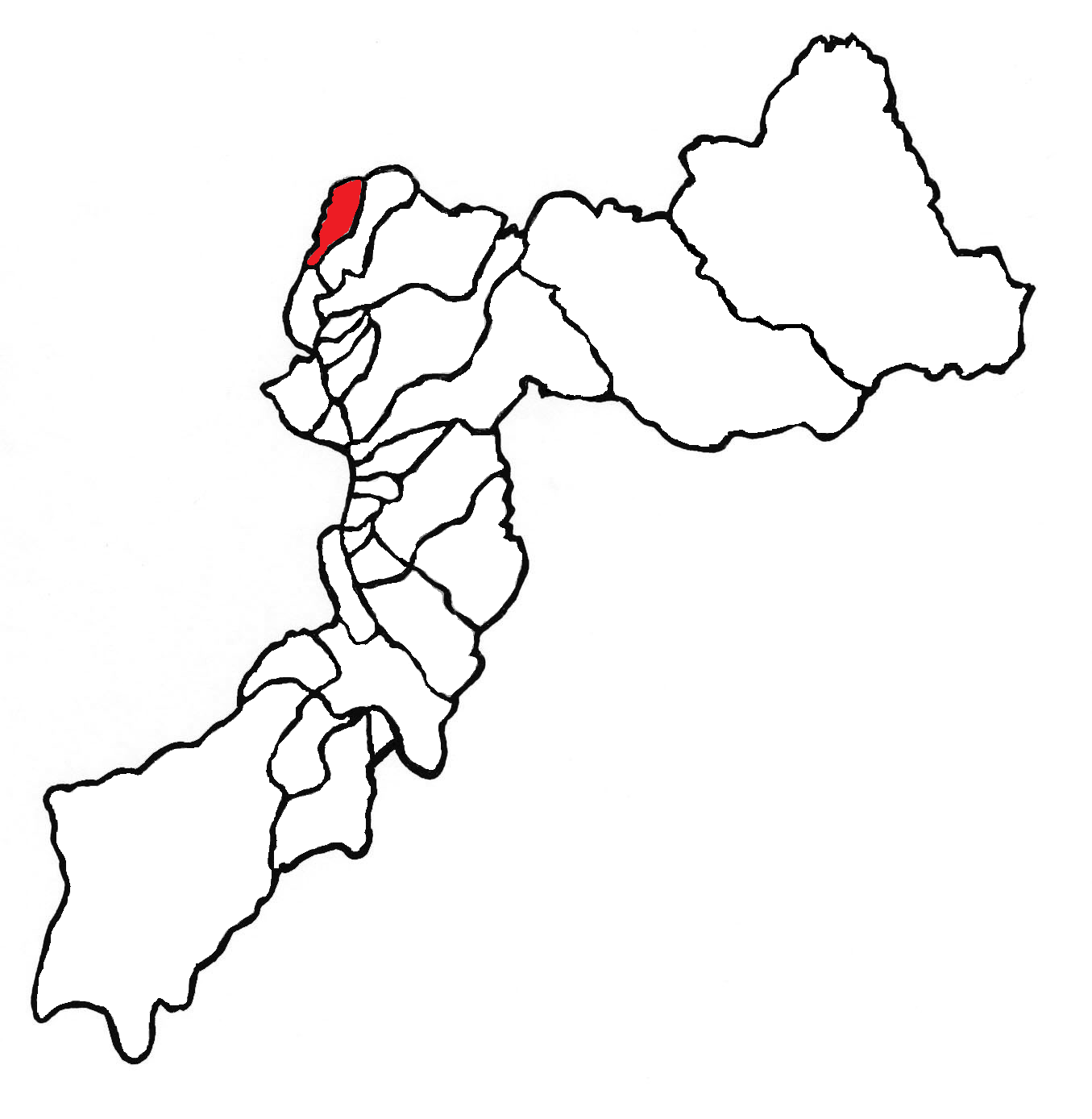 Ubicación del distrito en la provincia de Huancayo, departamento de Junín, Perú